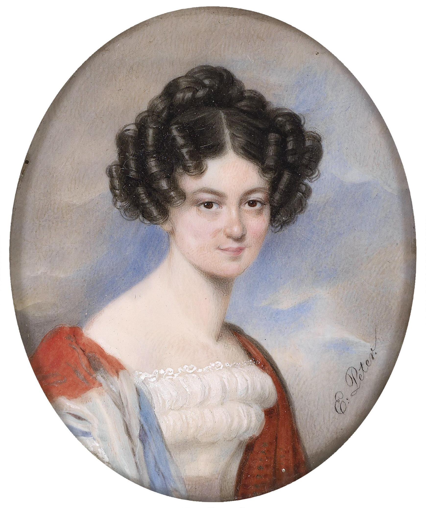 Bildnis der Gräfin Marie Chotek geb. Berchtold, in weißem Kleid vor Wolkenhintergrund